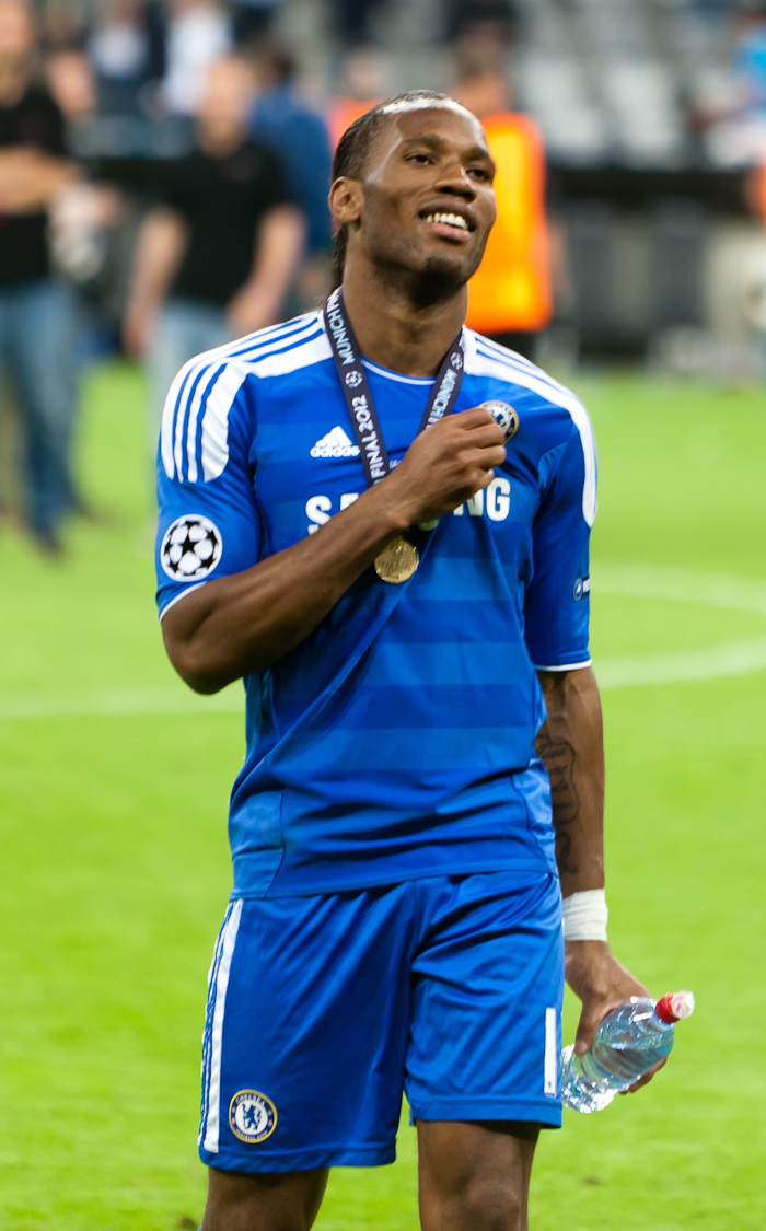 RA1_6703